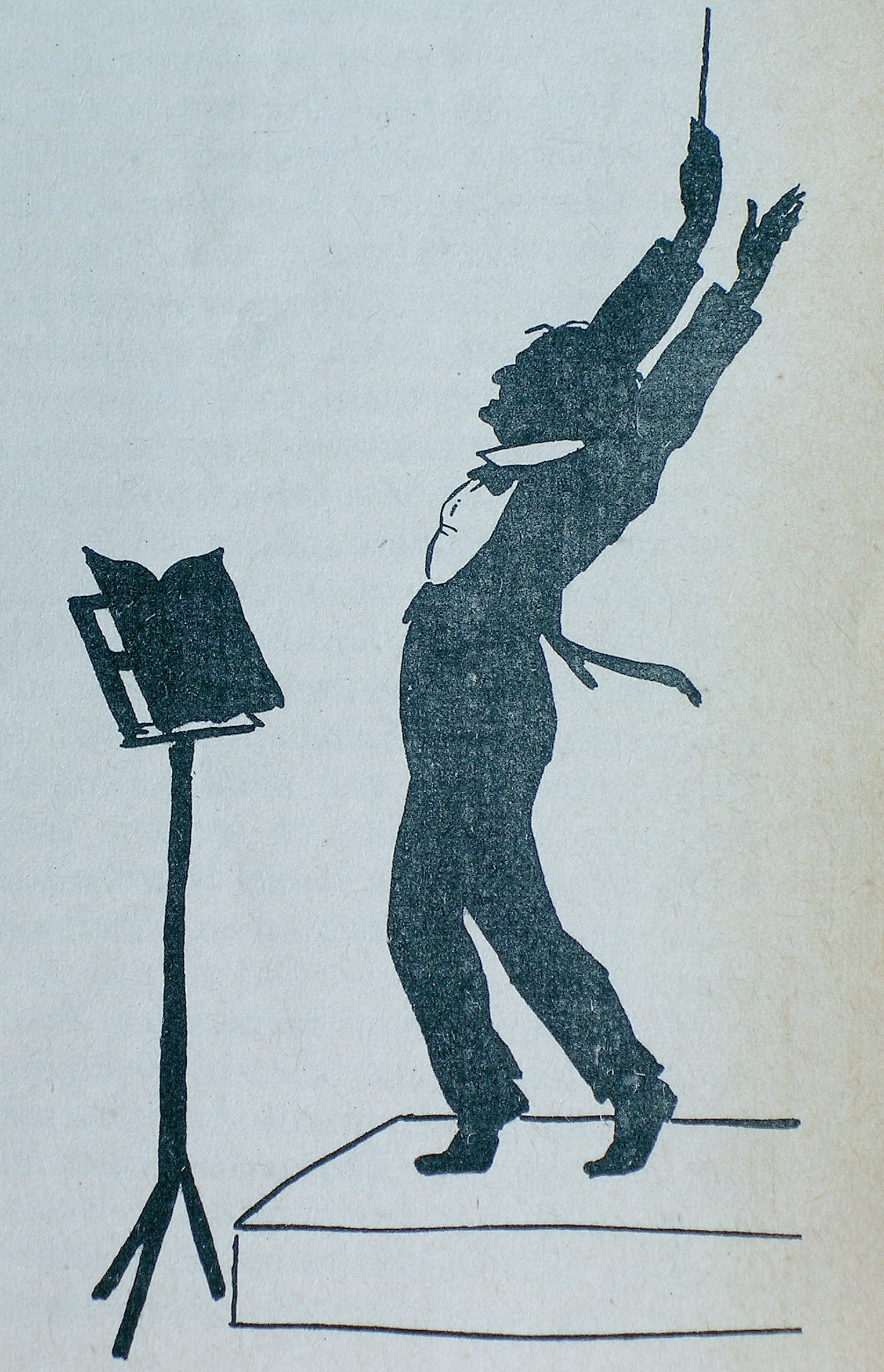 Schattenriss von Wilhem (Willi) Bithorn (1859–1928)